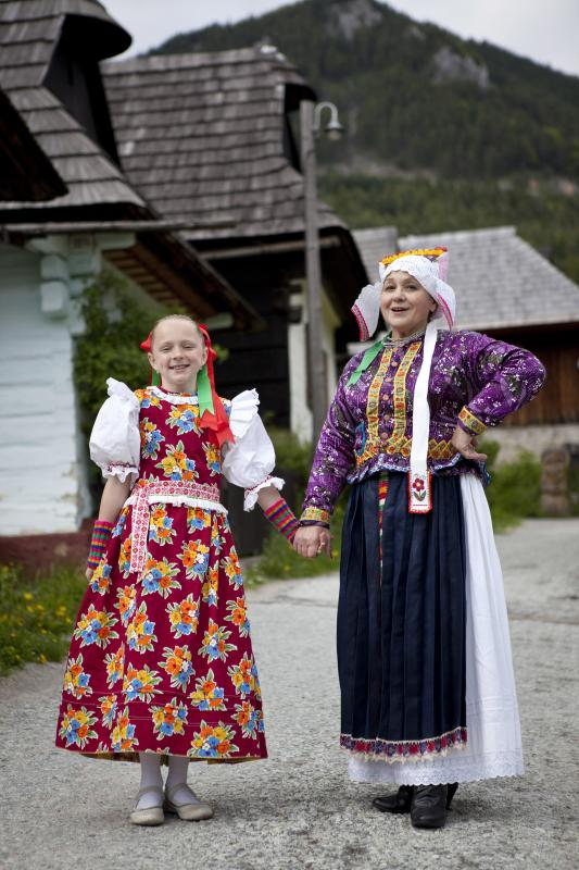 Foto: Jana Birošová